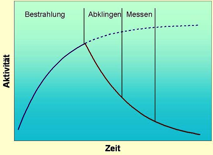 Zeitlicher Verlauf der Aktivität einer mit Neutronen bestrahlten Probe